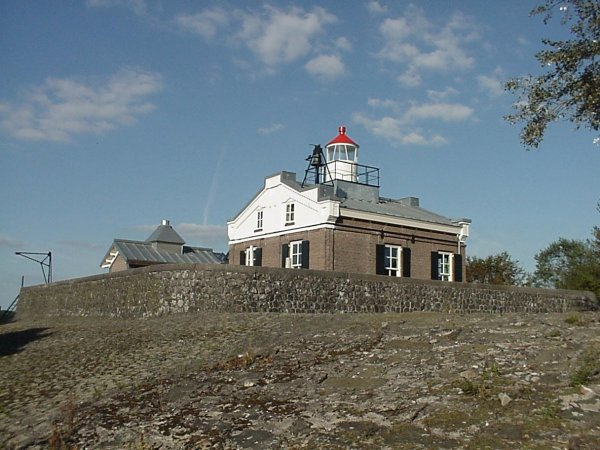 Oud Kraggenburg, de lichtwachterswoning aan het eind van de westelijke strekdam. Eigen werk.